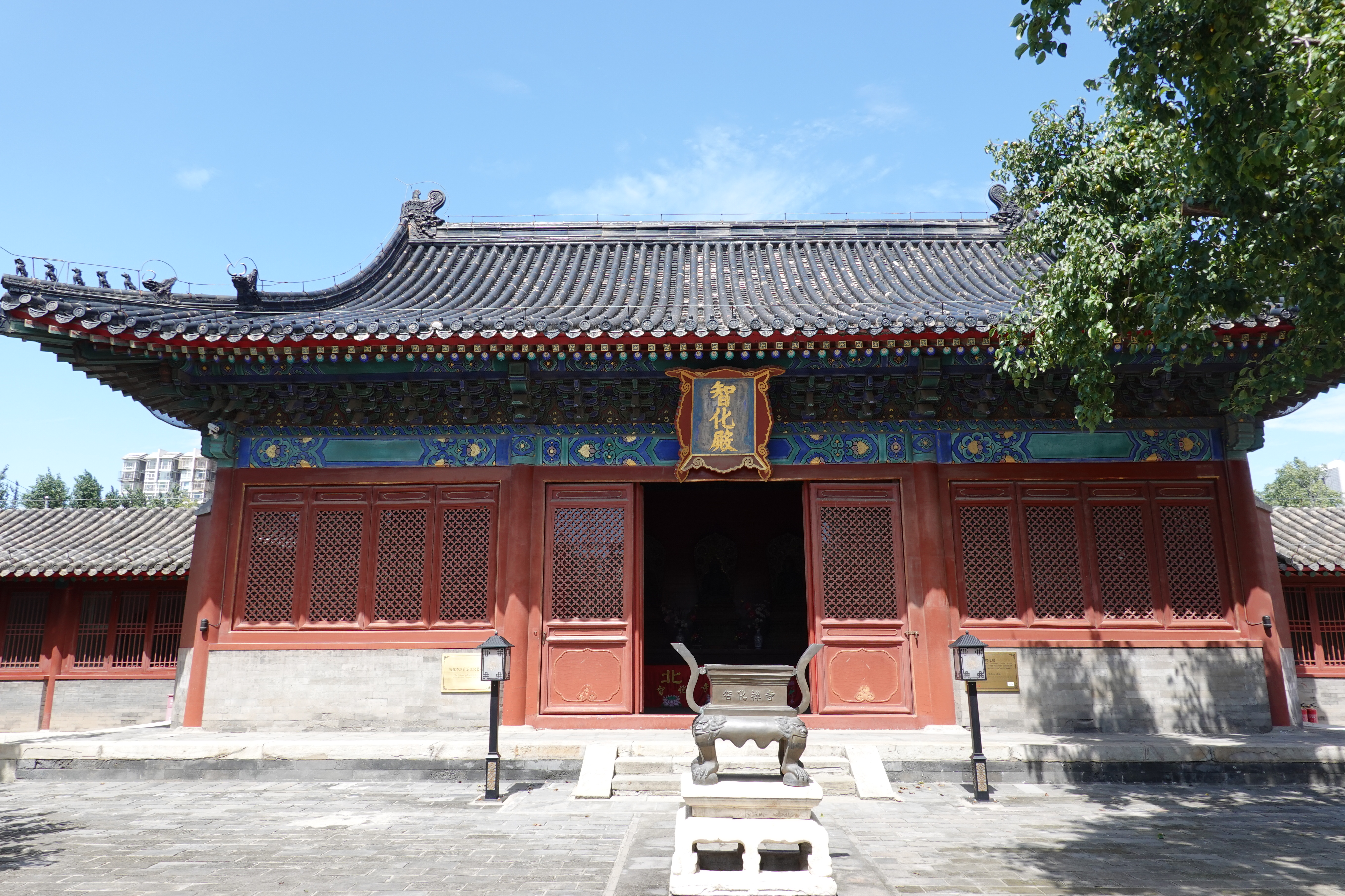 中文（中国大陆）: 智化寺智化殿